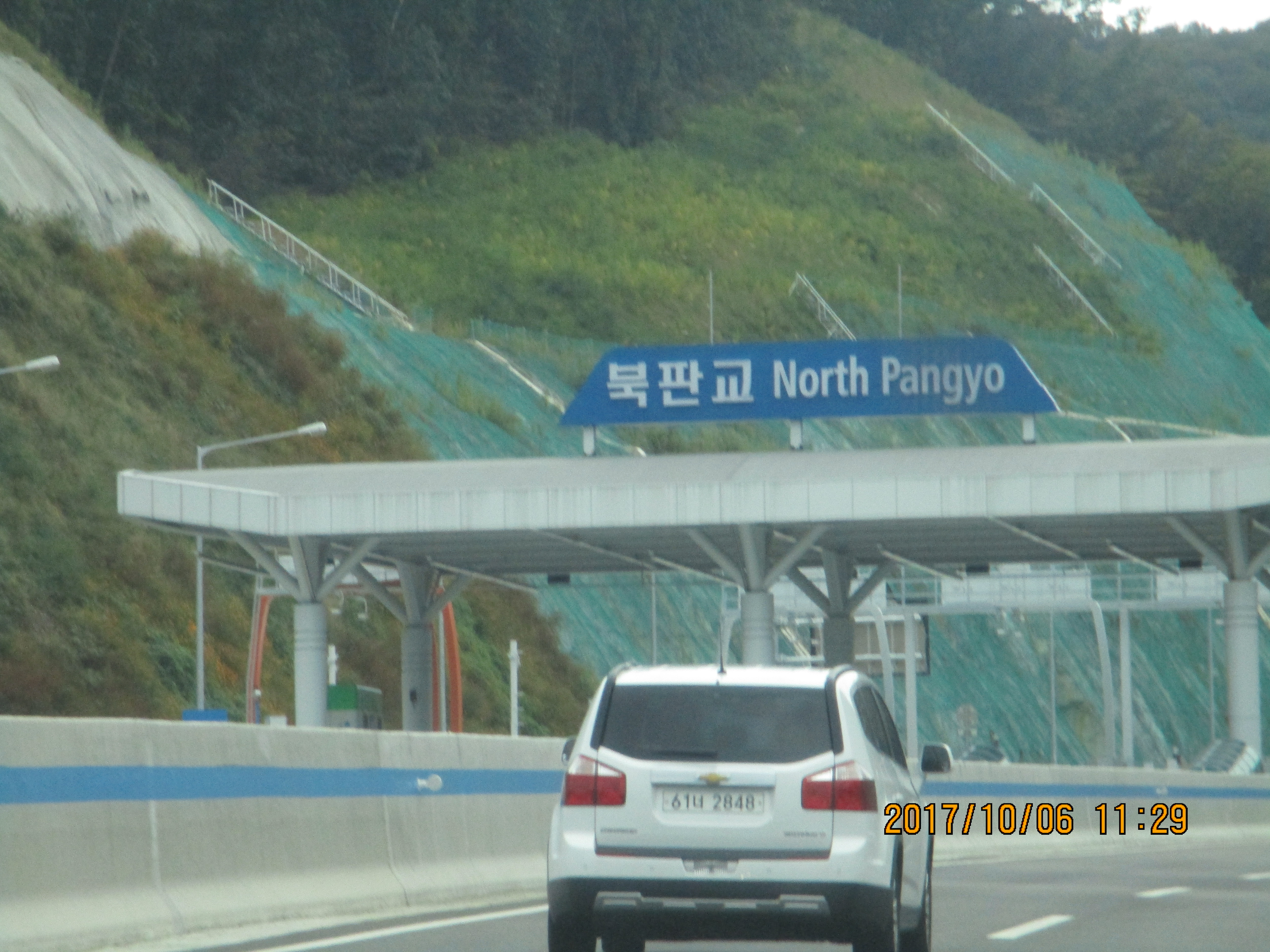 제가 자동차를 타면서 찍은 사진입니다.저작권 침해 아닙니다.